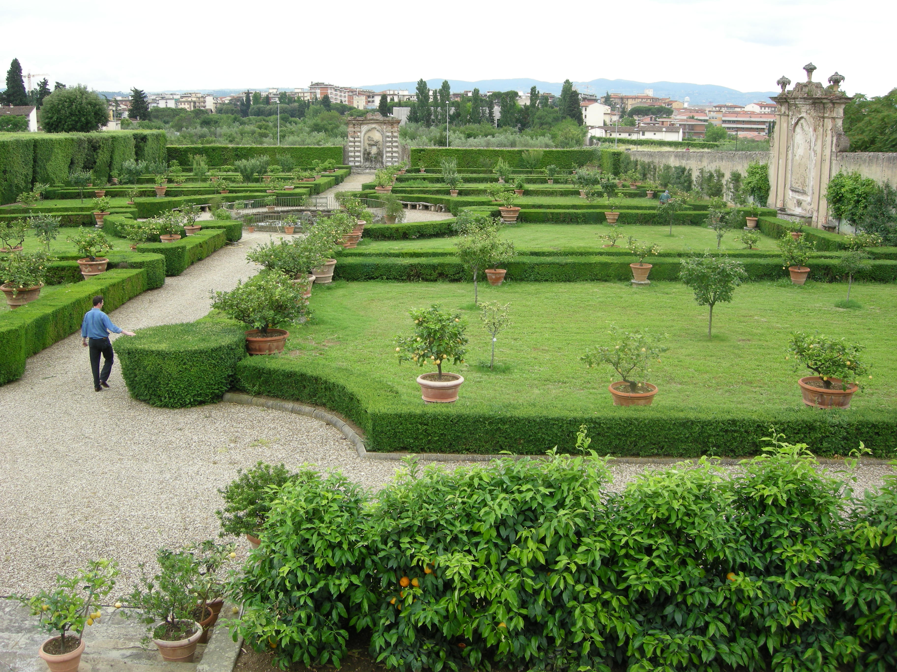 Villa la quiete, giardino